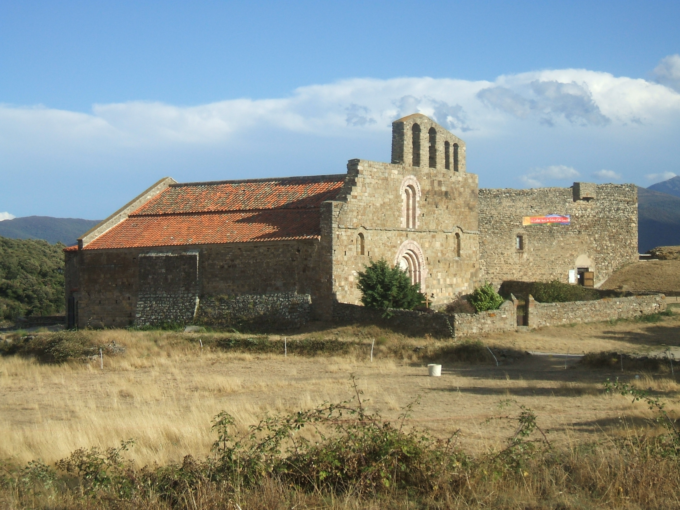 Prieuré de Marcevol du XIIe siècle (Pyrénées-Orientales, France) : vue d'ensemble du prieuré. Le mur du bâtiment situé à droite de l'église contient plusieurs assises de pierres en arête-de-poisson